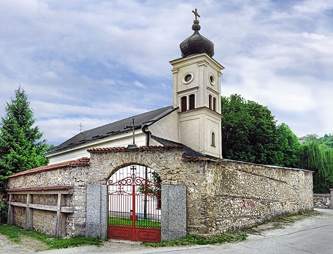 Crkva Uspenja presvete Bogorodice Travnik